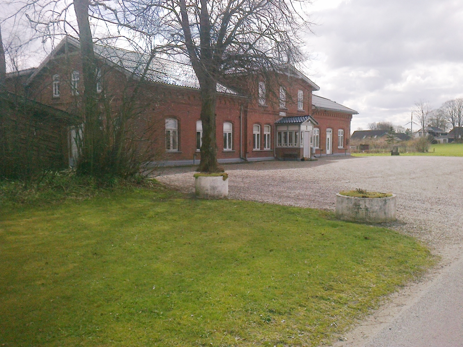 Klovtoft (ty: Klautoft) Amtsbanestation